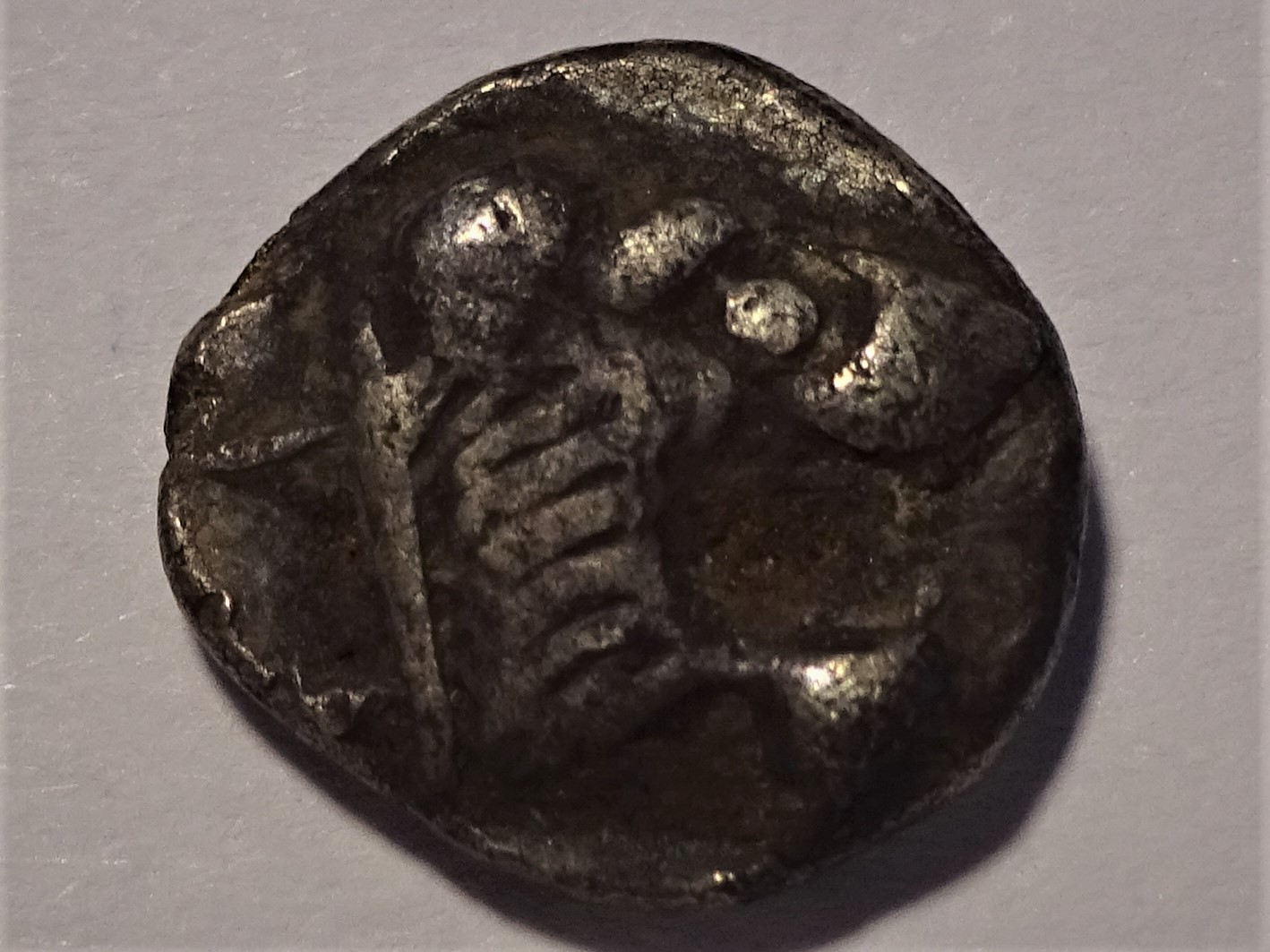 Diobol aus Knidos, 6. Jahrhundert v. Chr. Löwenkopf, Szaivert/Sear vgl Nr. 4856